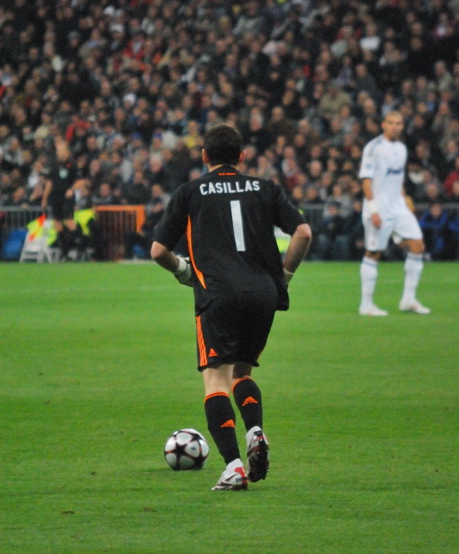 Real Madrid 1 - Zurich 0 Vuelve la Champions y vuelve...Ronaldo...que falta va haciendo